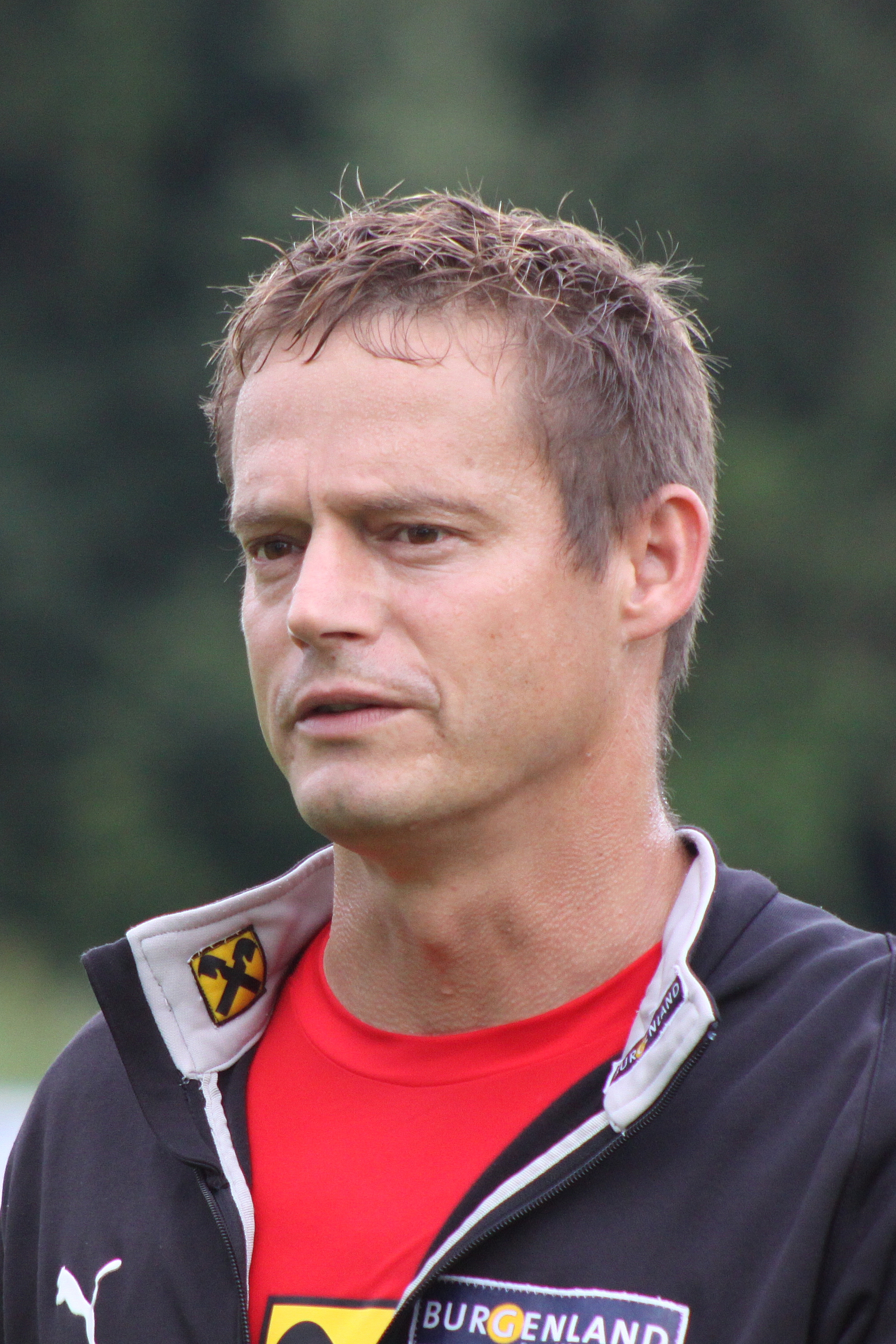 Otto Konrad (Tormanntrainer) - Österreichische U-21-Fußballnationalmannschaft (1)